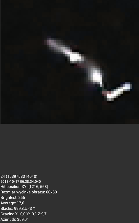 Rejestracja zdarzenia w aplikacji CREDO Detector